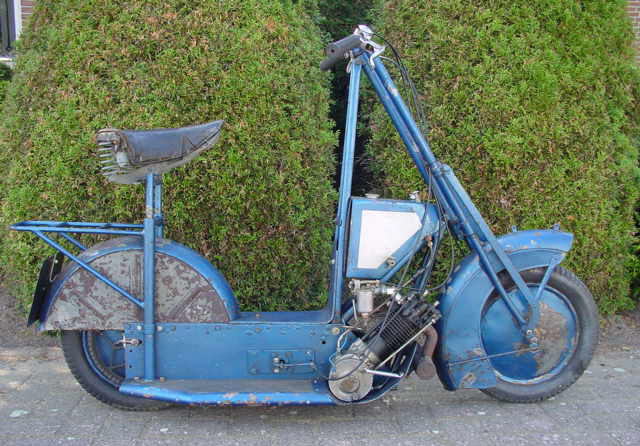 Toestemming van Yesterdays Antique Motorcycles (